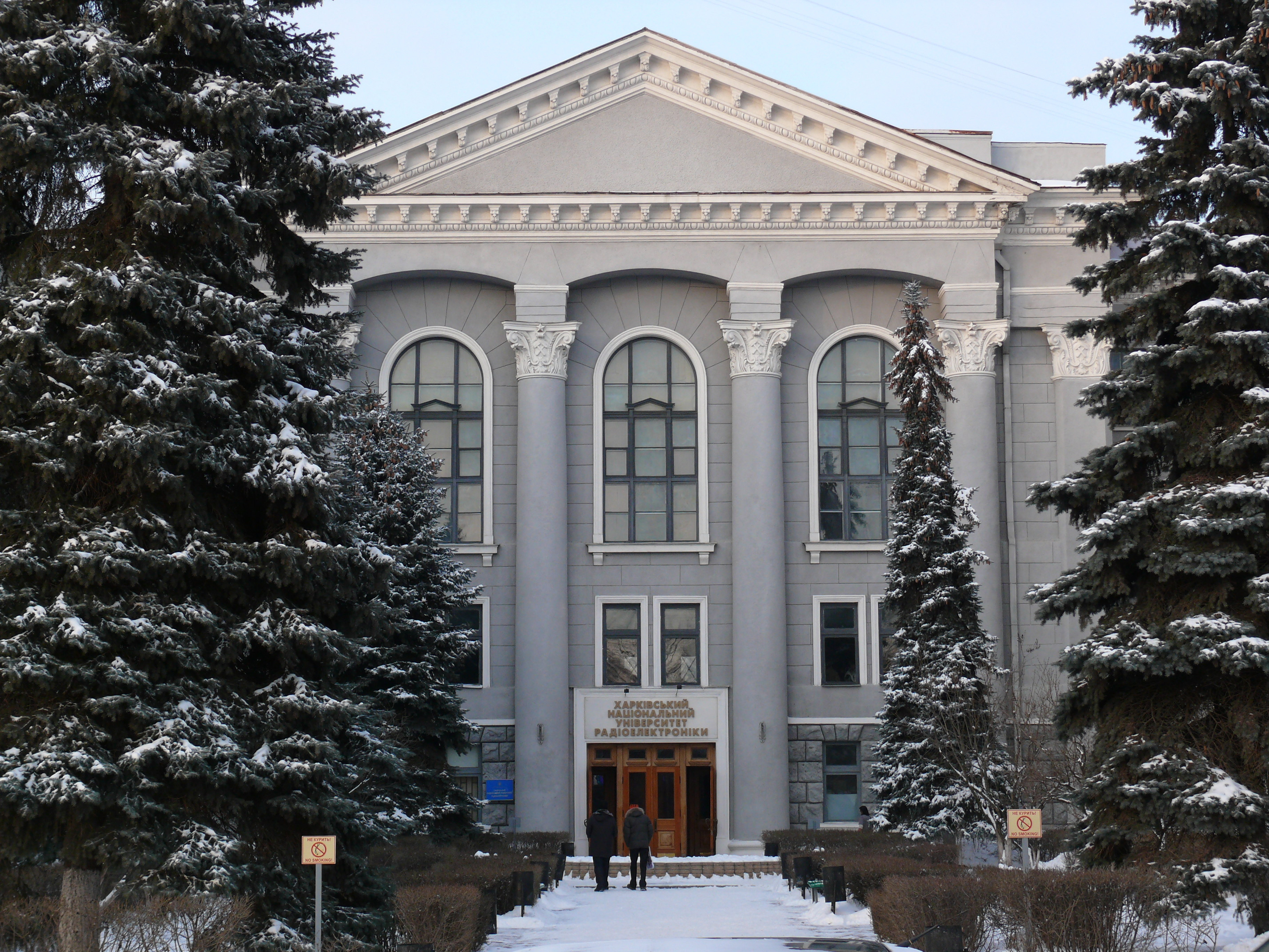 Kharkov. Serpovaya Street. Kh.I.R.E.